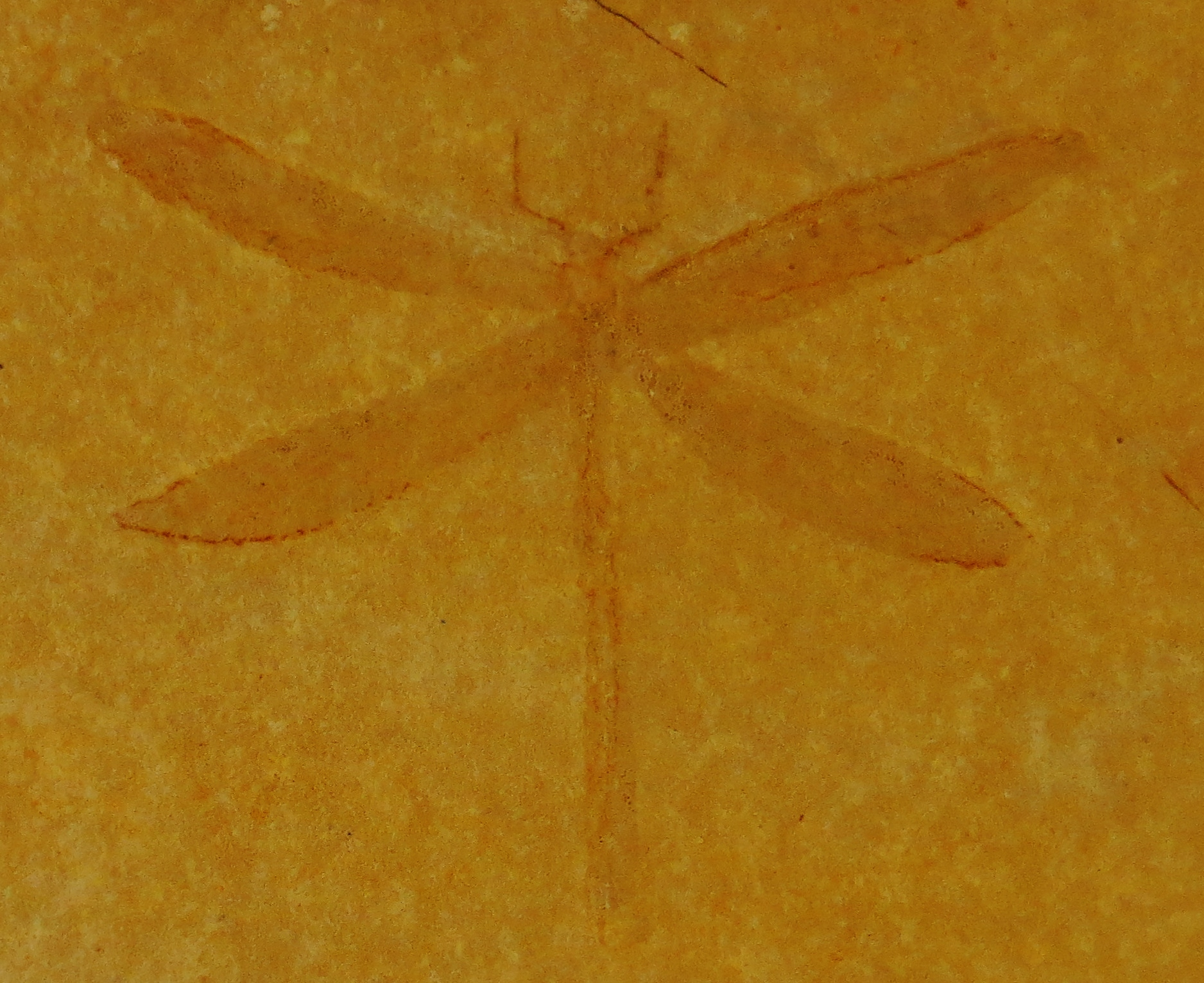 Took the picture at Museum Berger, Eichstaett